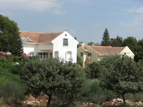 בתי מגורים טיפוסיים ביישוב הושעיה